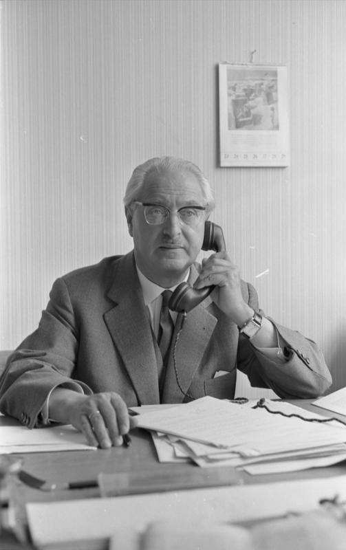 Bonn, Bundeshaus M. d. B. Josef Maier, CDU, in seinem Arbeitszimmer